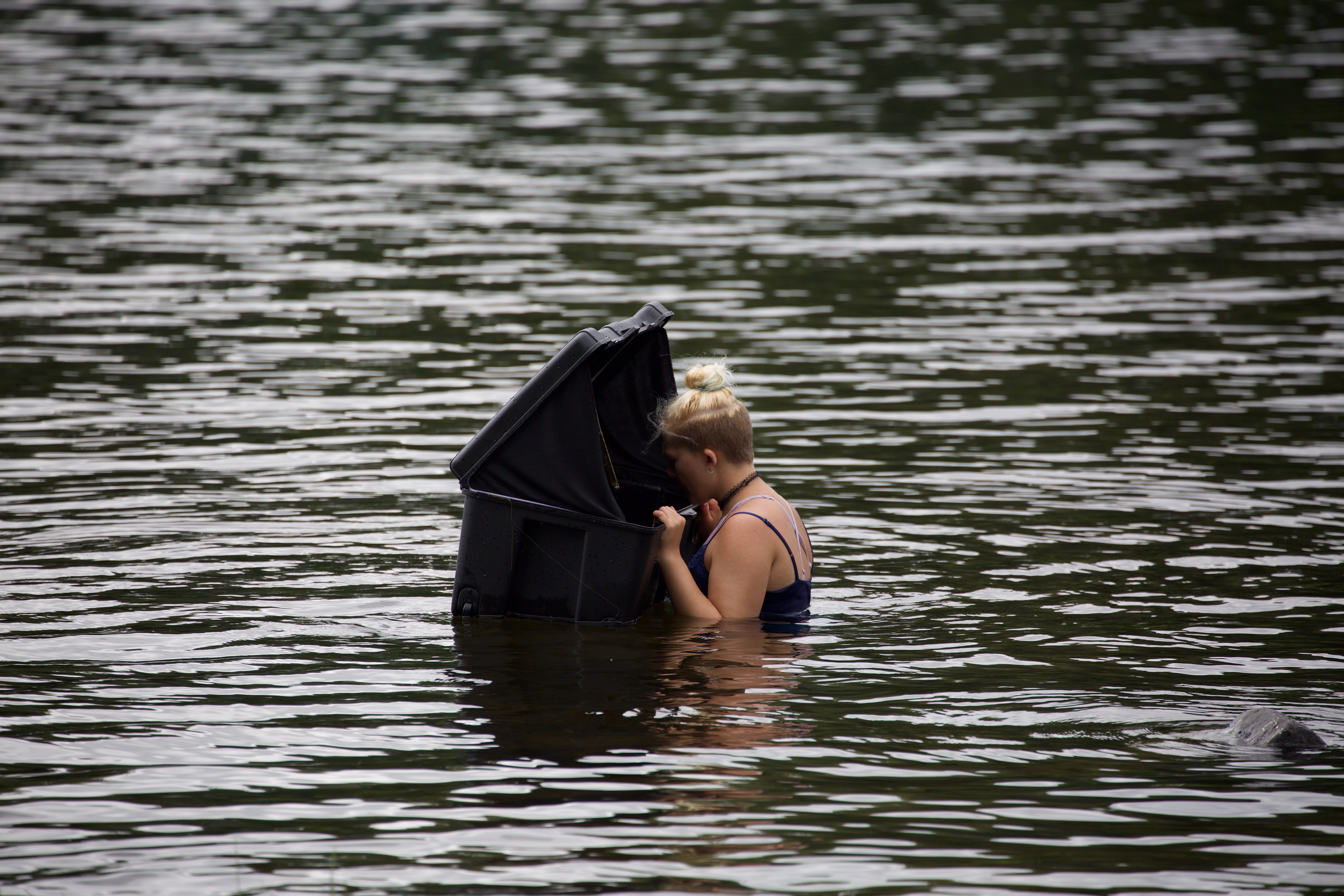 4G7A9370